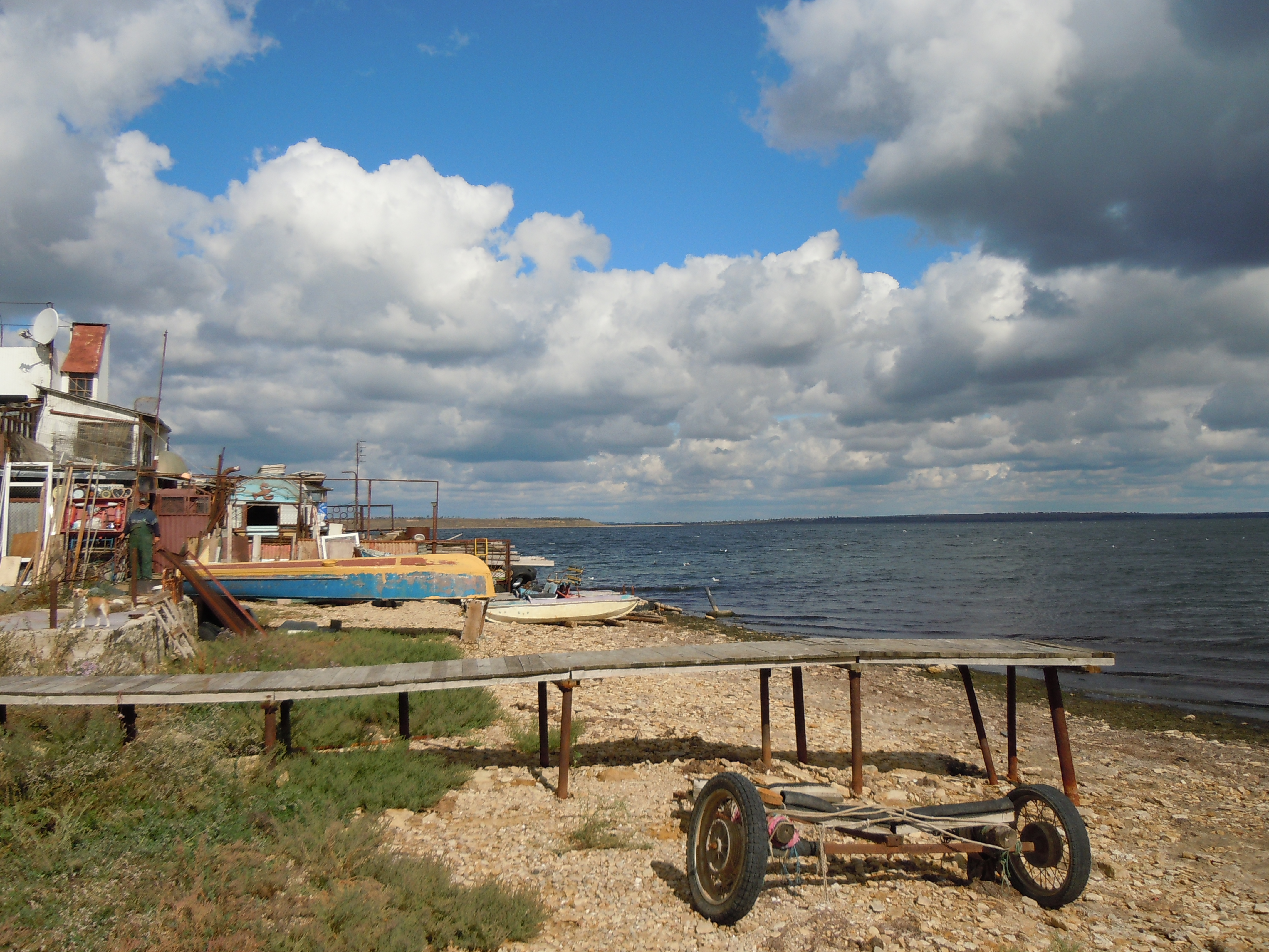 Рибальські курені на березі Тилігульського лиману у Кошарах, Одеська область